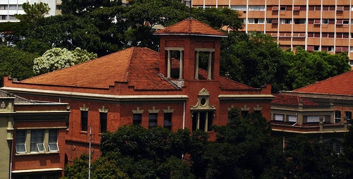 Prédio 3, da Faculdade de Direito